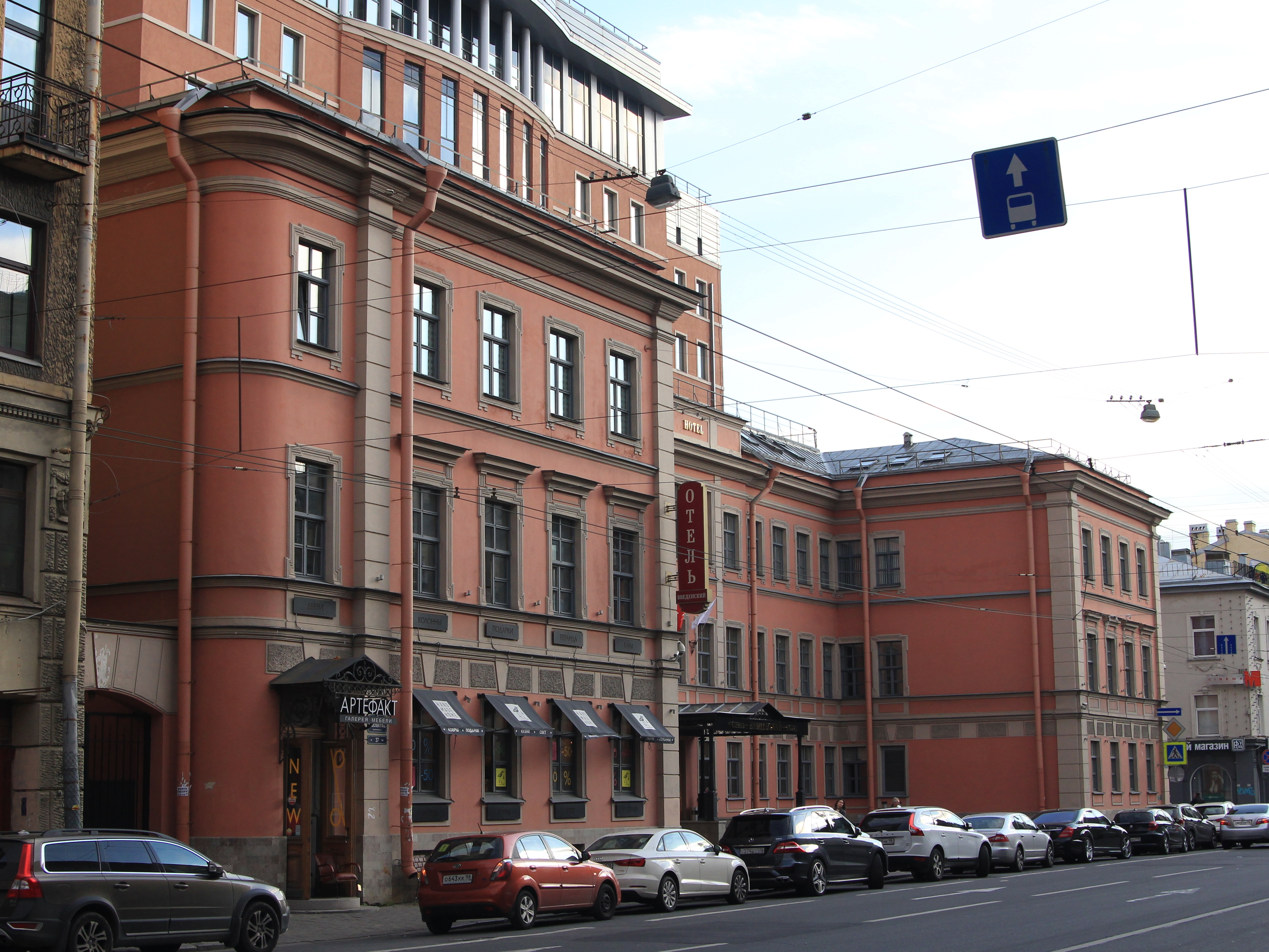 Введенская гимназия (гимназия им. Петра Великого): Большой проспект Петроградской стороны, 37, улица Шамшева, 3, Петроградский район, Санкт-Петербург